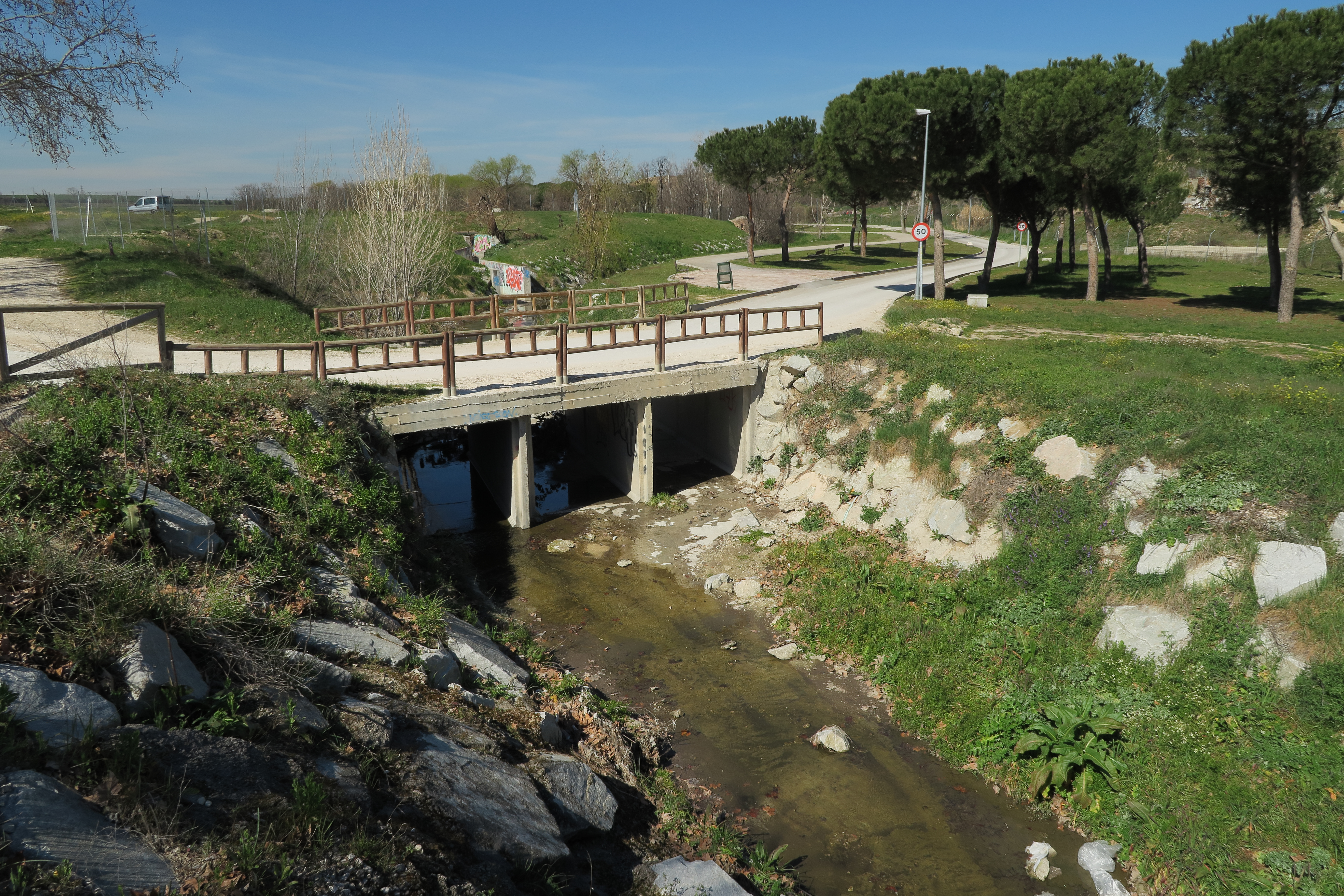 Arroyo Butarque, puente sobre el arroyo a su paso por Leganés